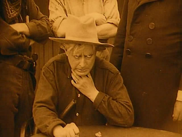 Harold Entwistle dans "Salomy Jane" (1914)